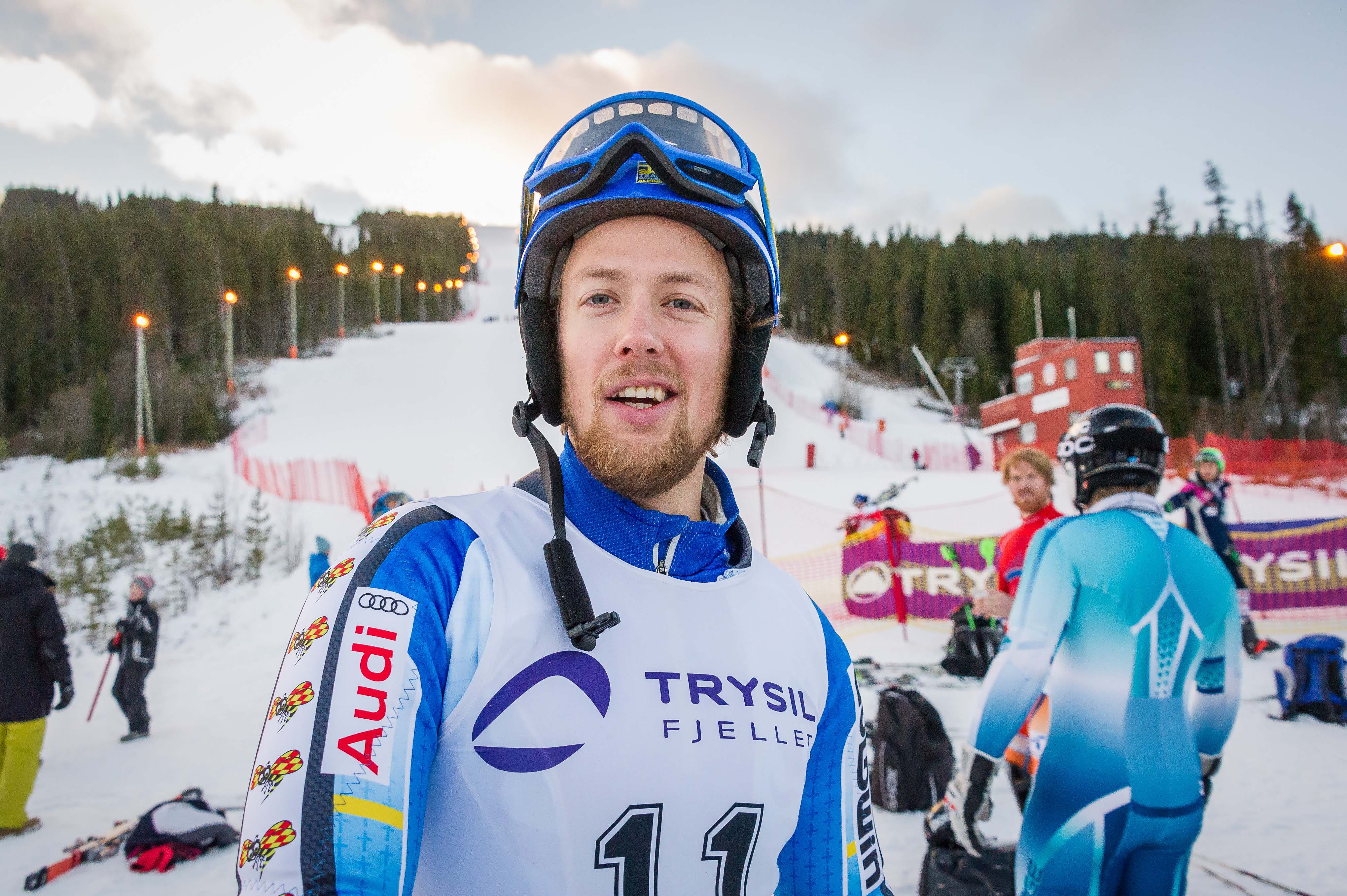 Axel Bäck fra Sverige vant e-cup i slalåm i Trysil. Foto: Ola Matsson